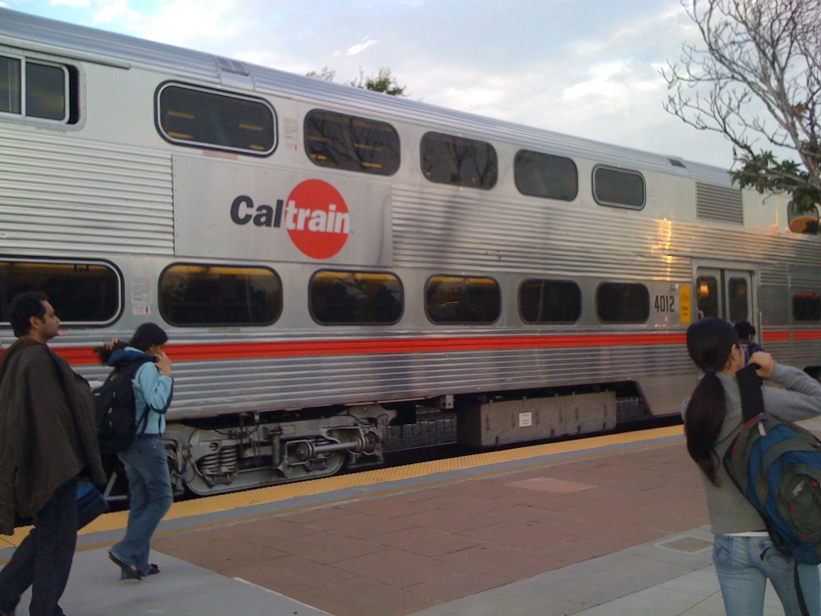 CalTrain's double decker passenger car.